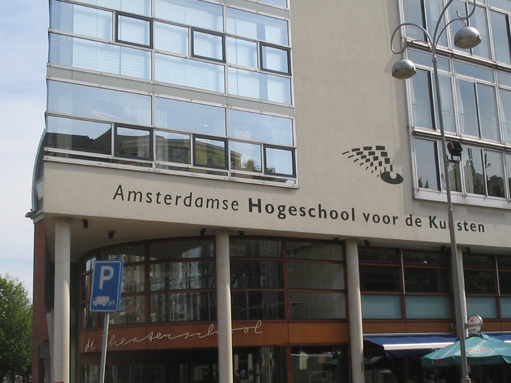 Logo on Amsterdamse hogeschool voor de kunsten building (Amsterdam, Netherlands), july 2005